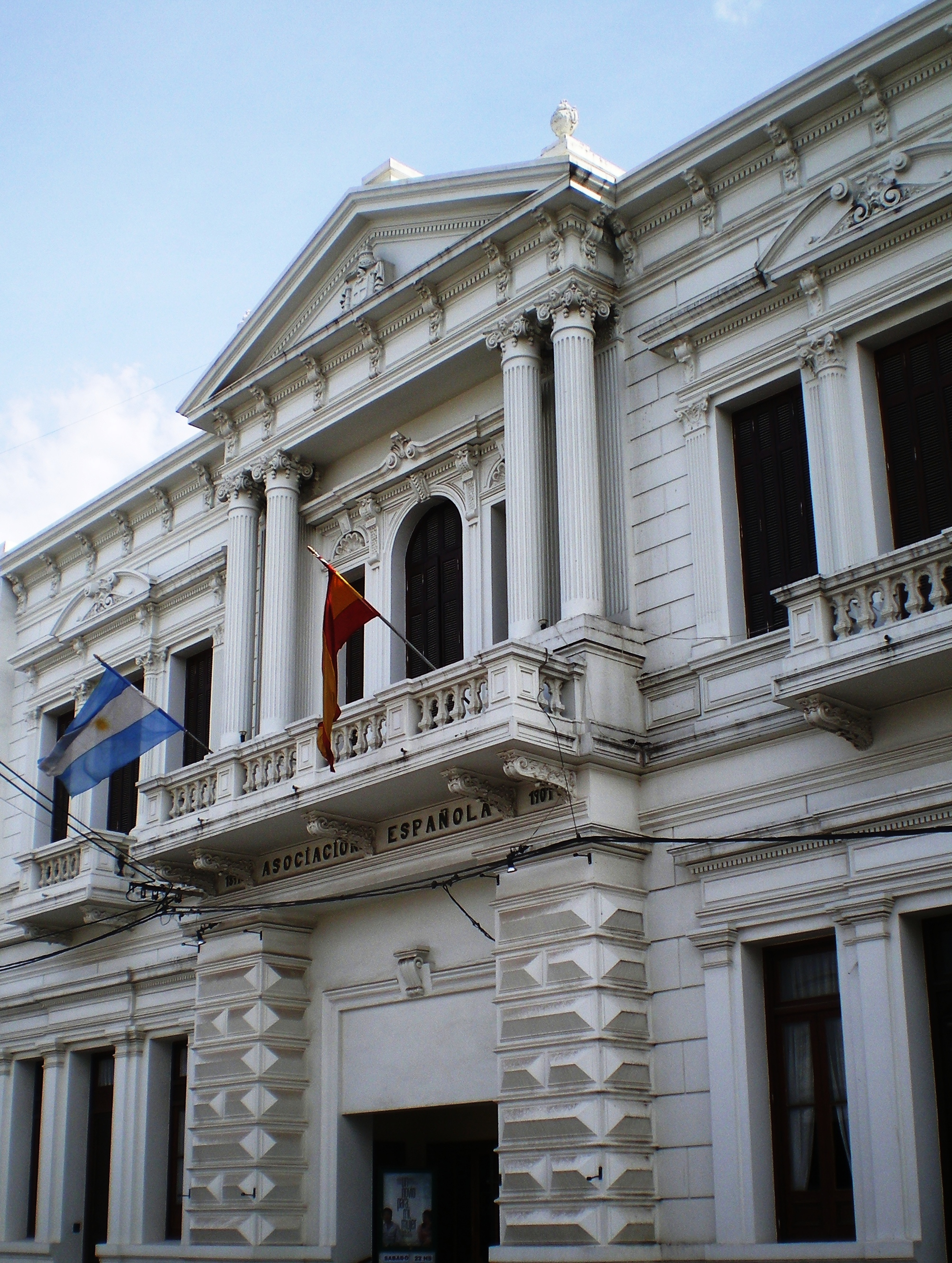 Fachada del Teatro Español, ubicado en la calle Stegman de la ciudad de Coronel Pringles. Por el pasaron figuras de la Argentina y del mundo.